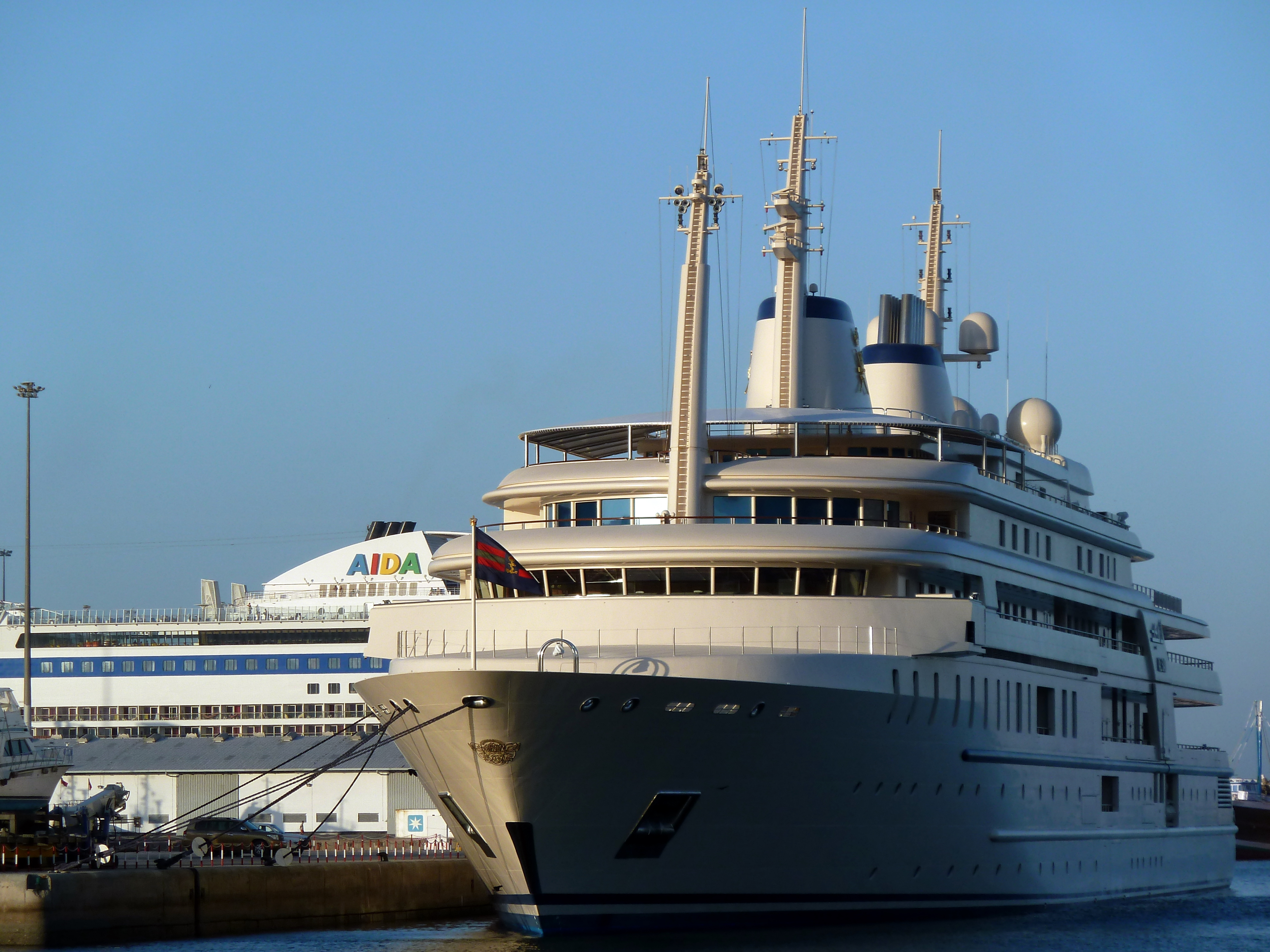 Königliche Yacht Al Said im Hafen von Maskat vor der AIDAdiva --- اليخت الملكي آل سعيد في ميناء مسقط قبل AIDAdiva